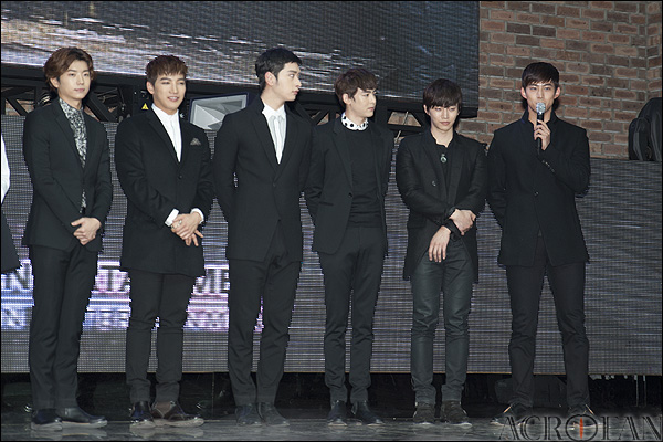 스마일게이트-JYP엔터테인먼트 MOU 체결식